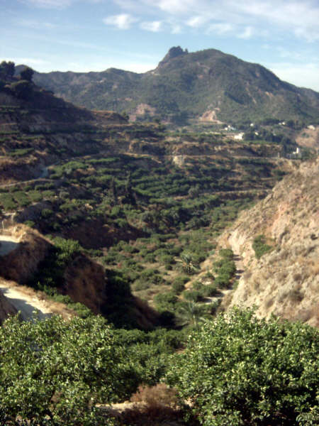 Valle del Puntarrón, en Beniaján (Murcia), España